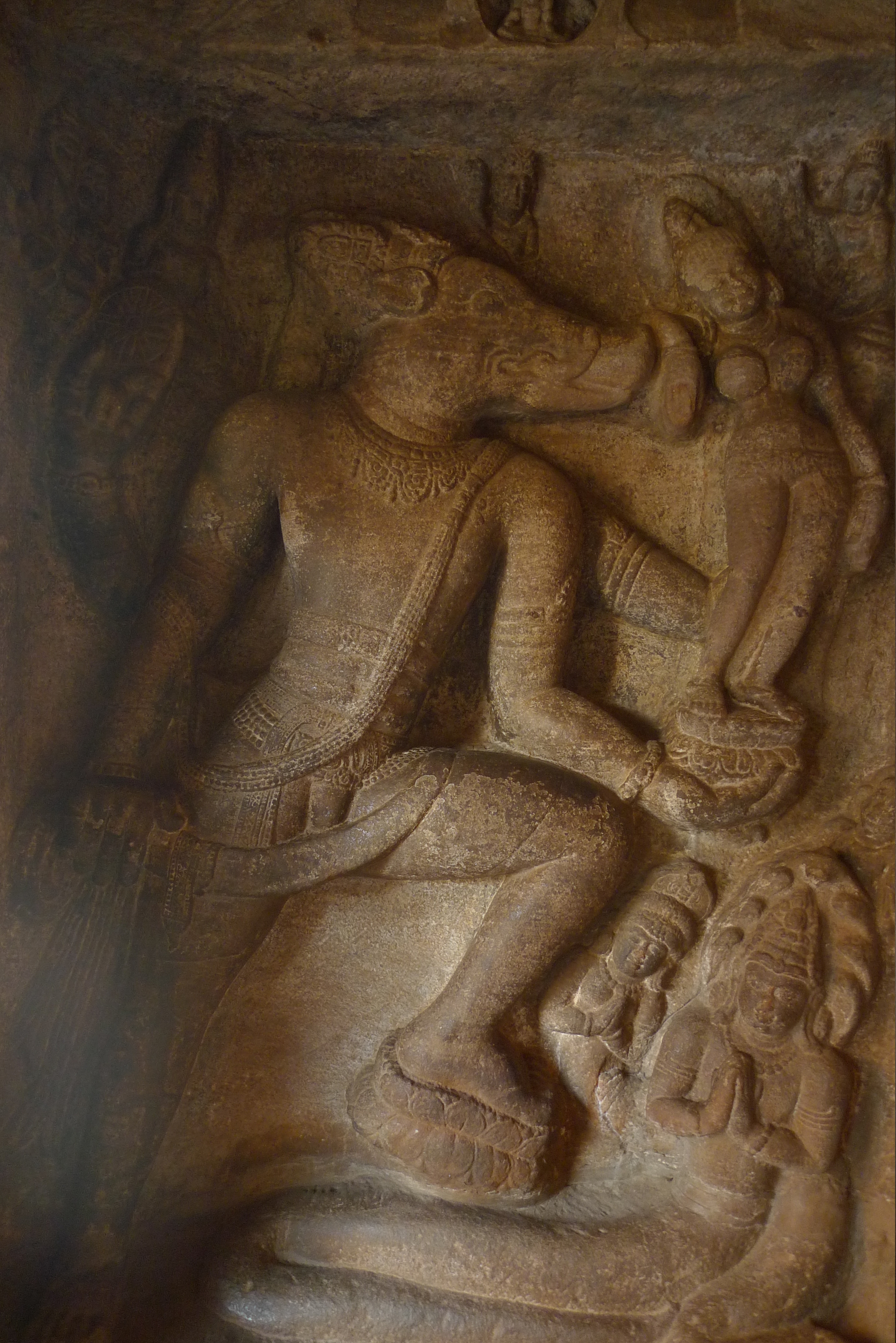 Varaha Badami